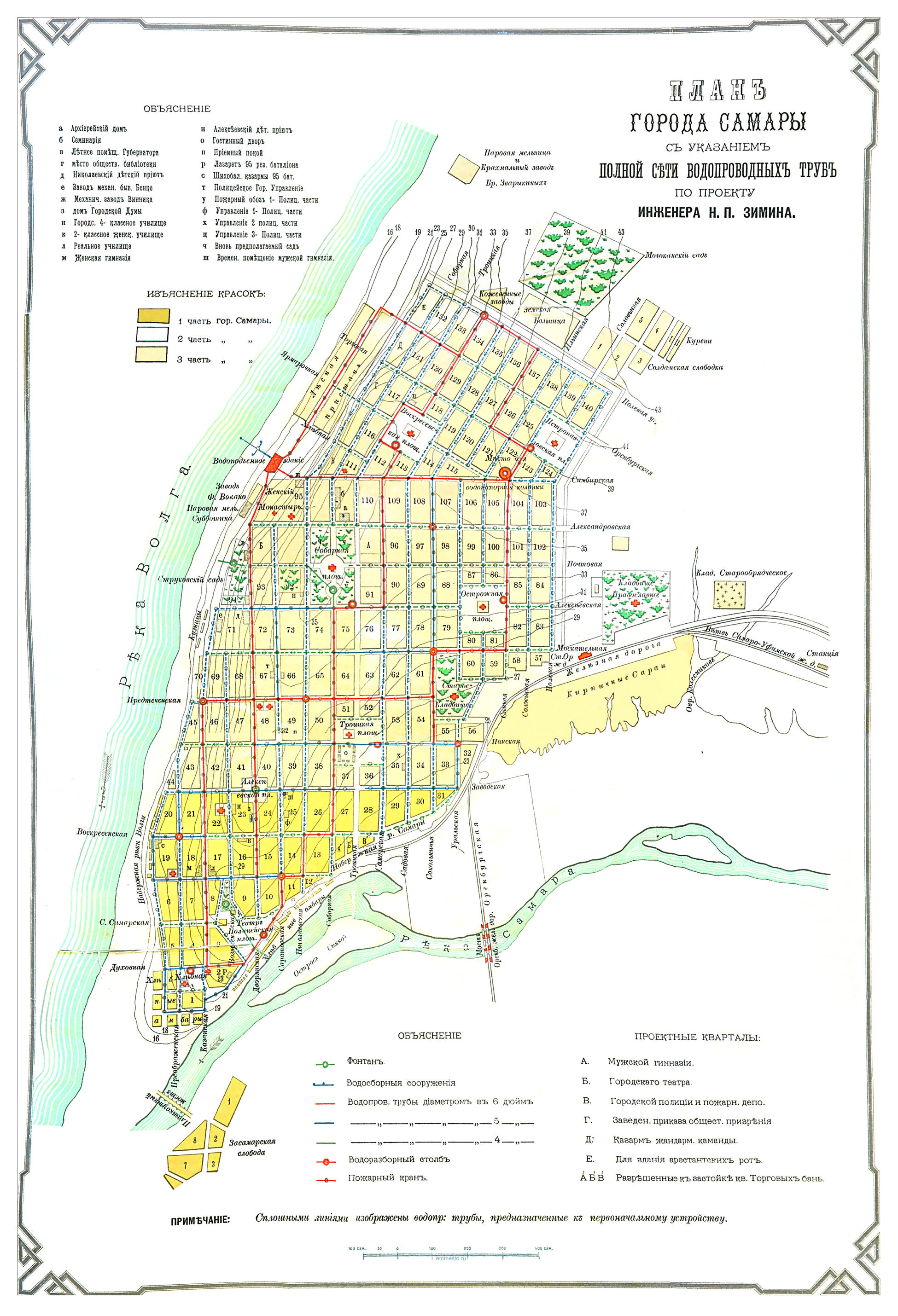 План города Самара по проекту инженера Зимина. 1886 год